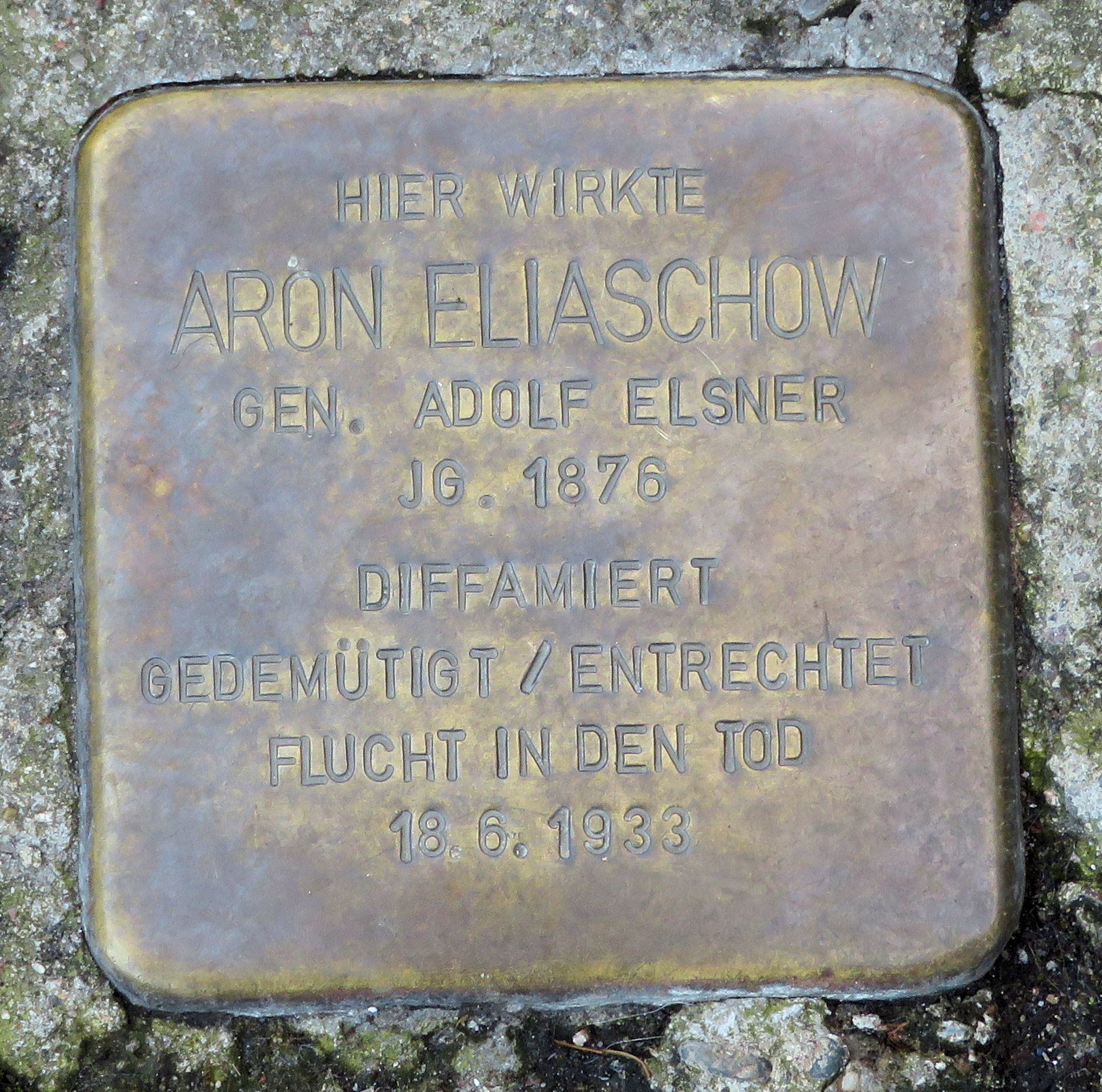 Stolperstein für Aron Eliaschow in Heilbronn